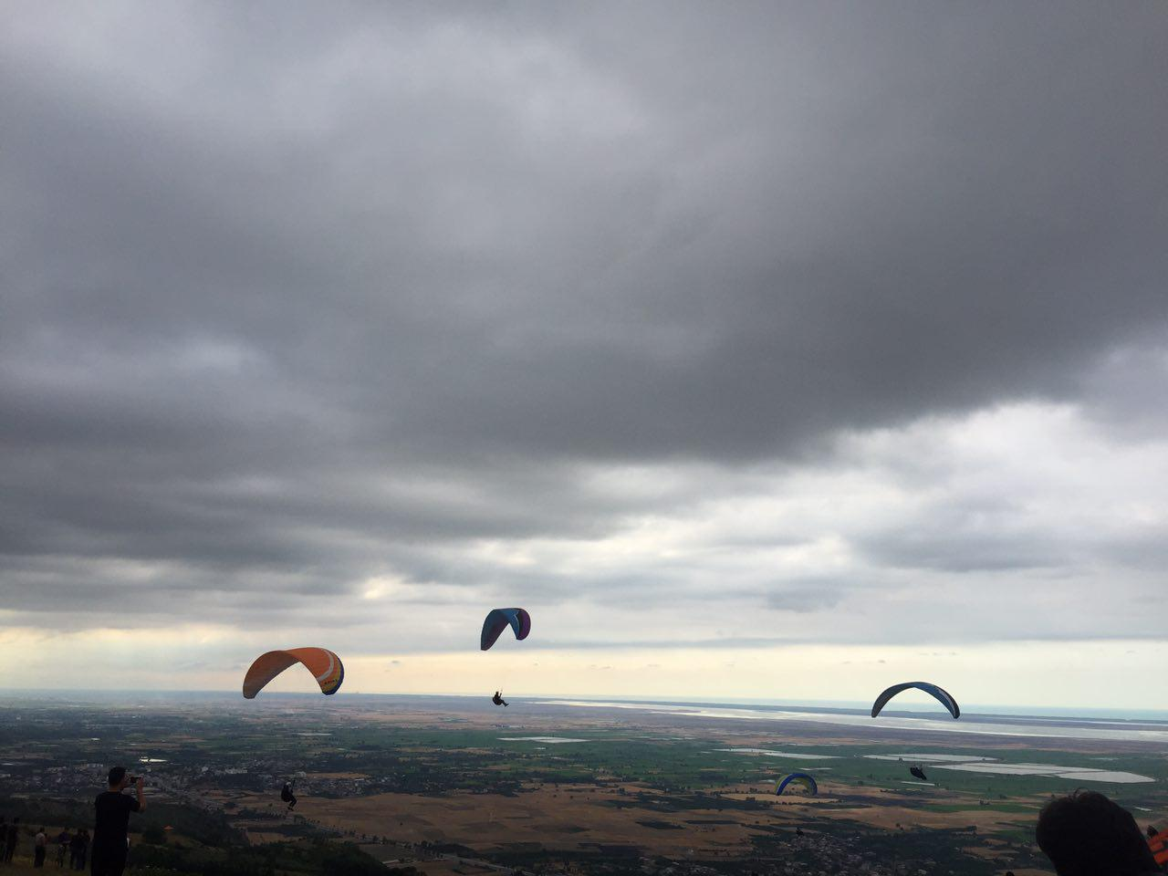 پرواز پاراگلایدرها در روستای مهدیرجه و نمایی از دریای خزر و شبه‌جزیرۀ میانکاله